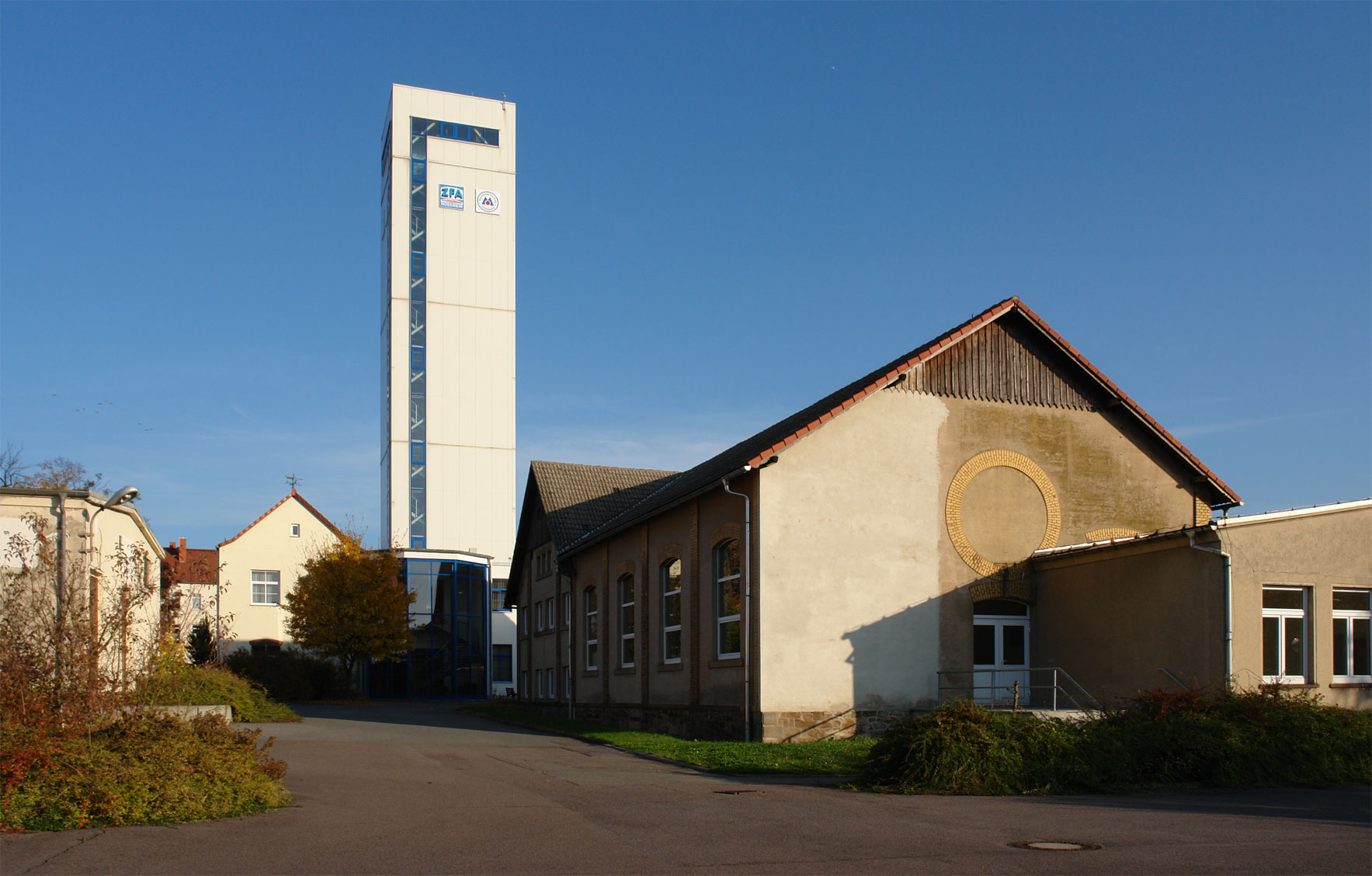 Testturm des Zentrum der Förder- und Aufzugstechnik Roßwein und Gebäude der HTW Mittweida